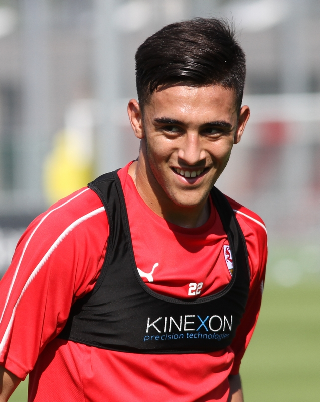 Nicolas Gonzalez bei seiner ersten Trainingseinheit mit dem VfB. Aufgenommen von